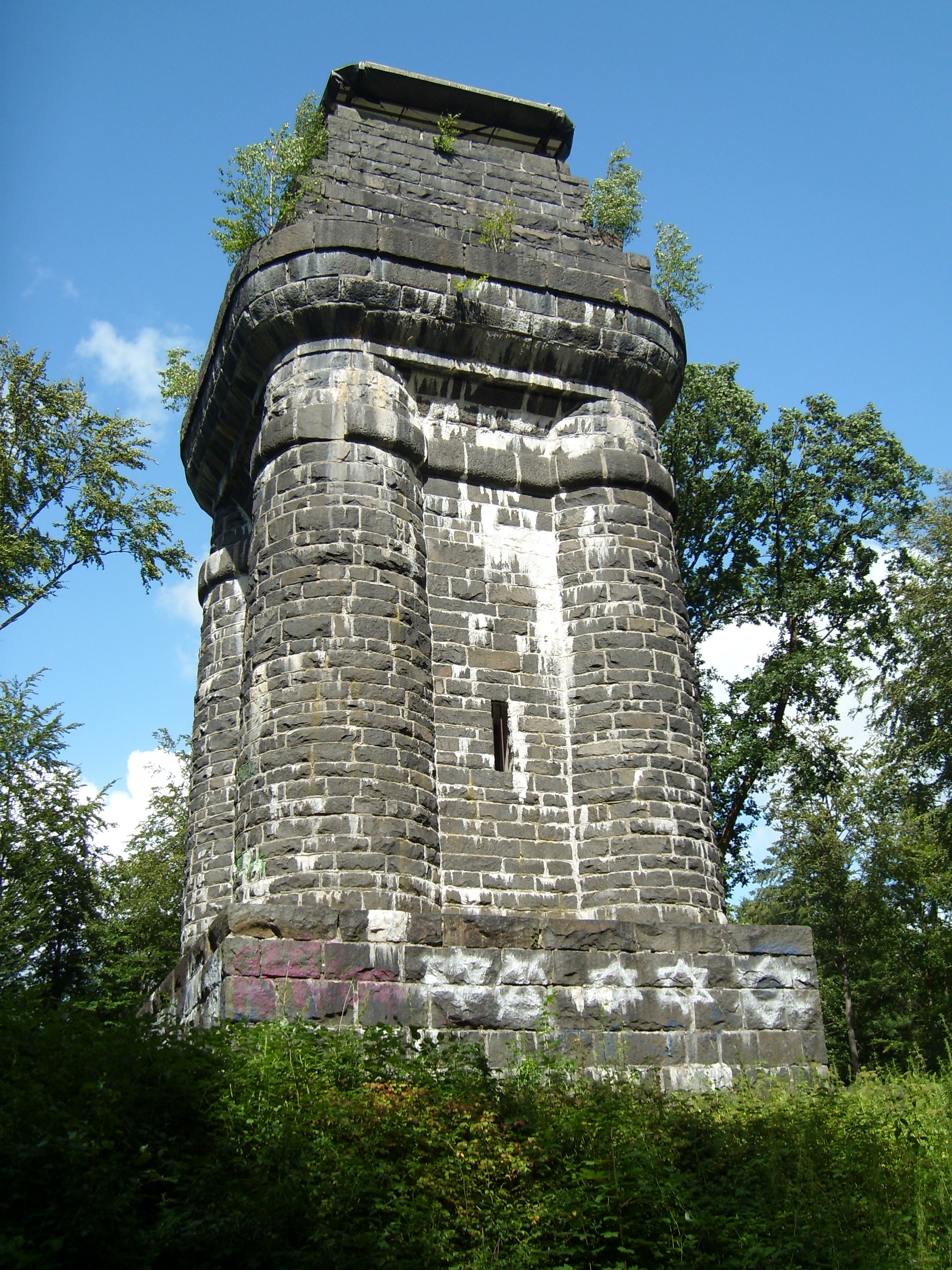 Der Bismarckturm im Itzehoer Stadtforst